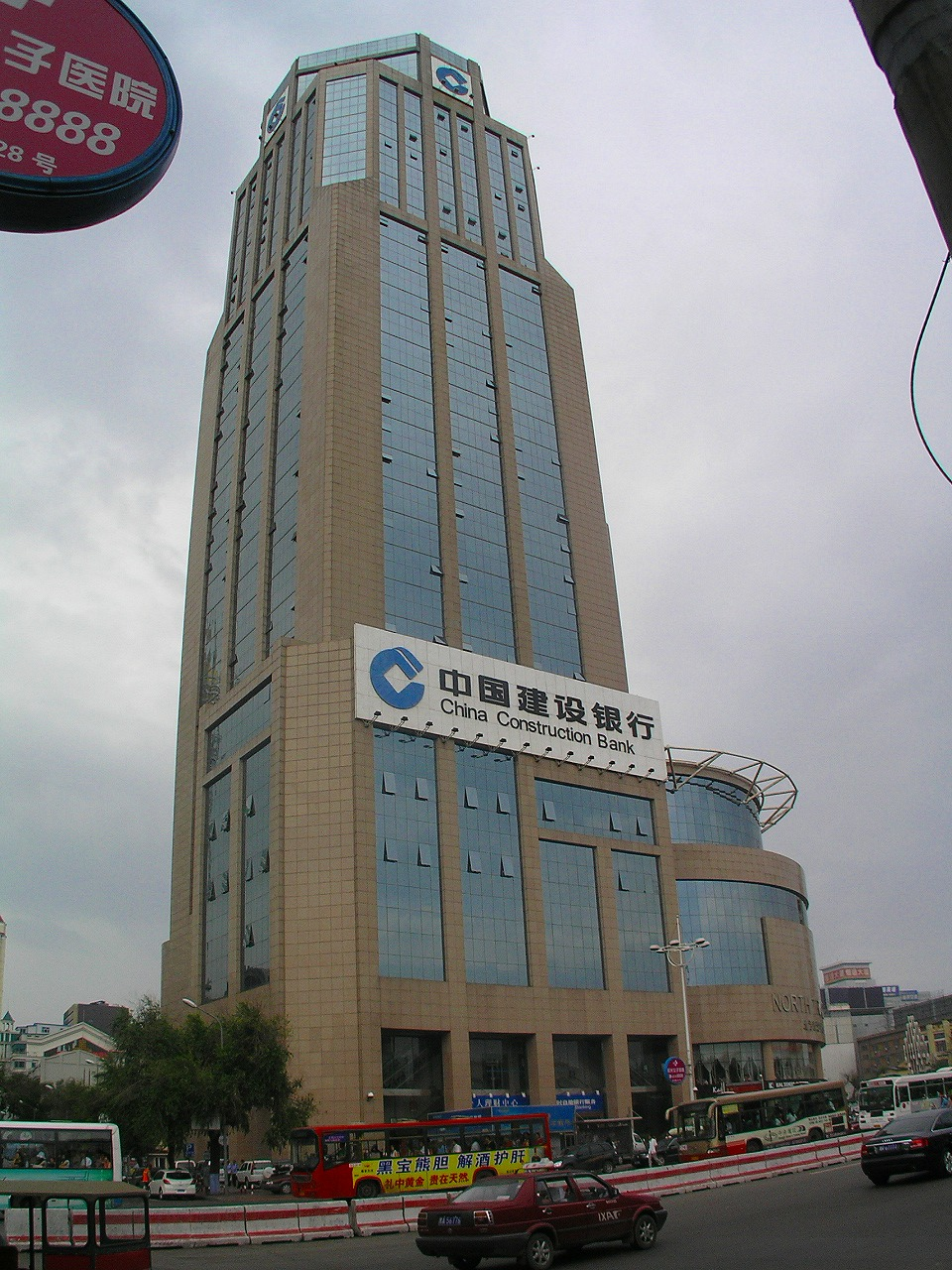 中国建設銀行